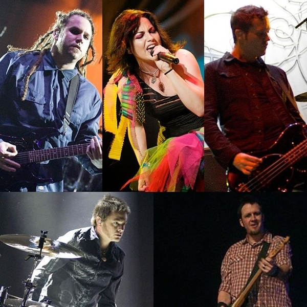 Formação da banda de rock americana Evanescence, desde 2007.